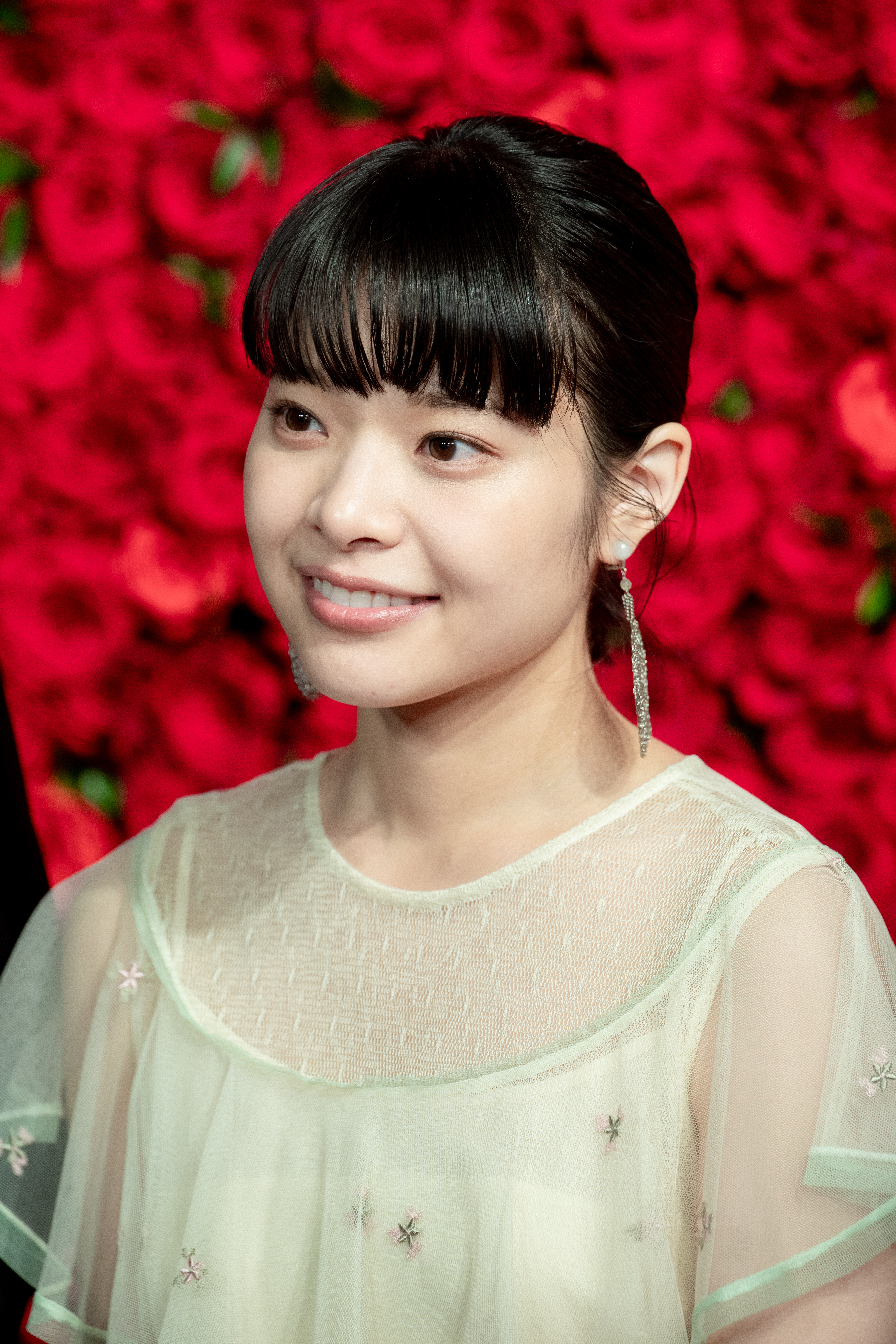 第30回 東京国際映画祭 オープニングセレモニー 岸井ゆきの (愛がなんだ)